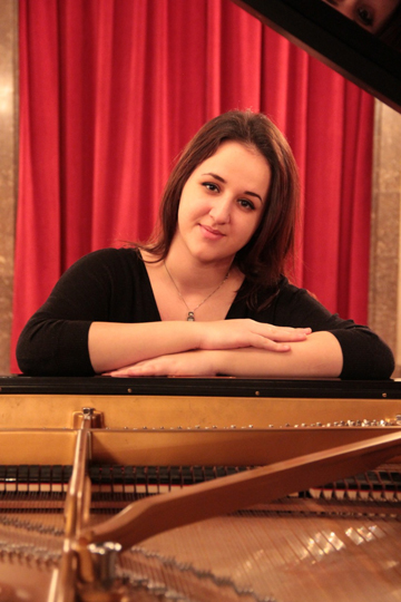 Српски (ћирилица): Сара Вујадиновић